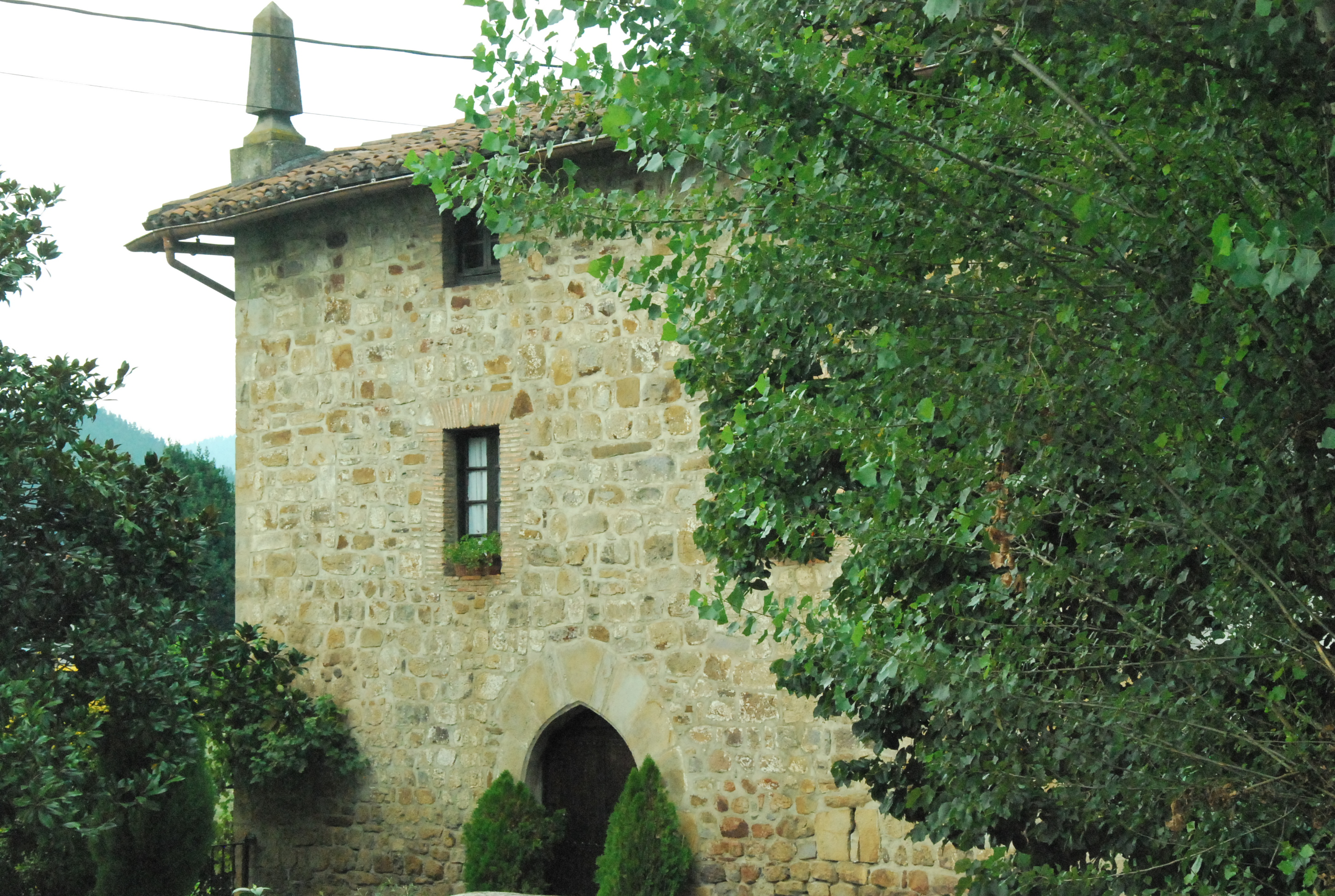 Oñatiko San Pedro auzoko Garibai torria, Torreauzo bezala ere ezaguna